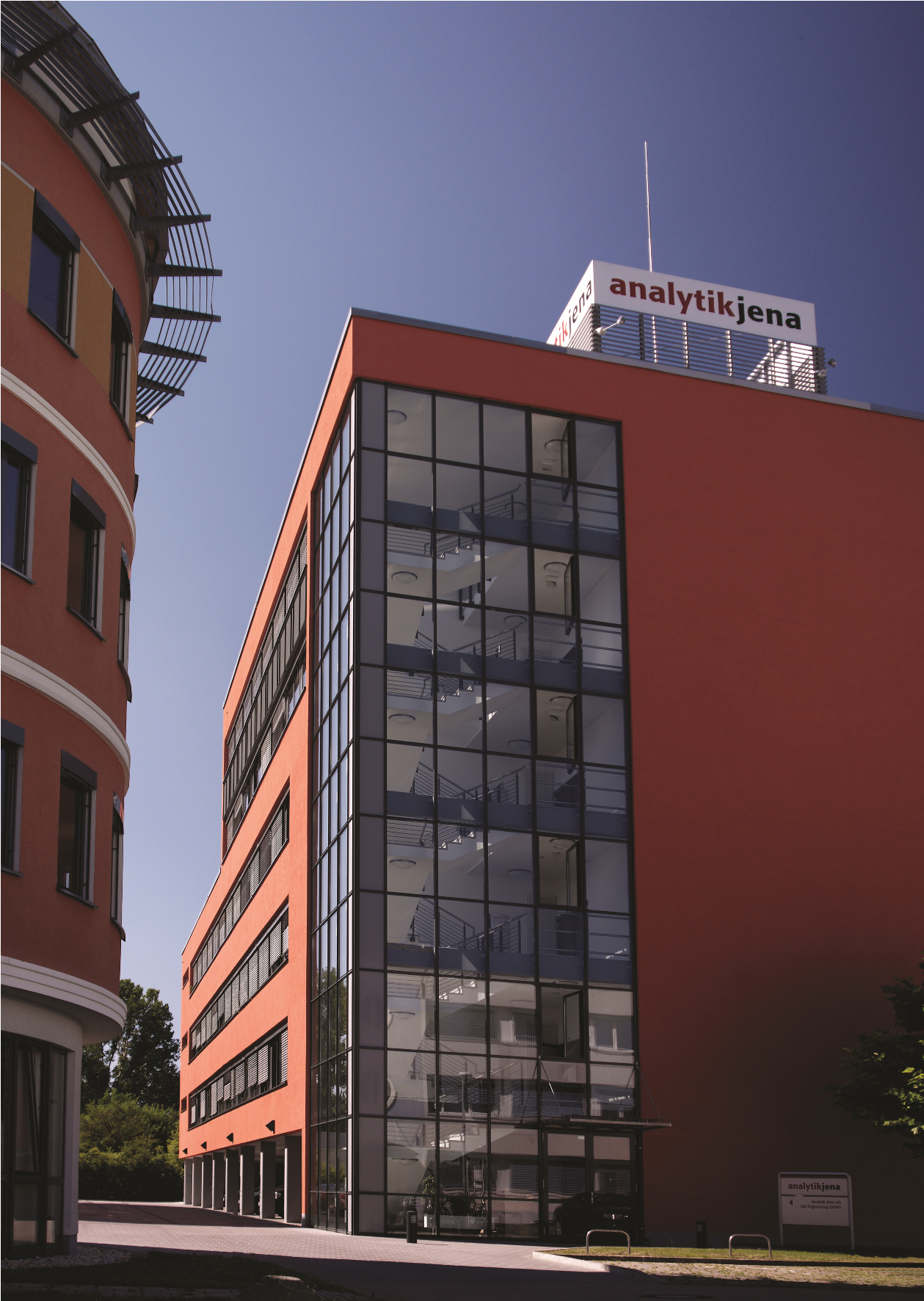 Штаб-квартира компании Аналитик Йена в Германии